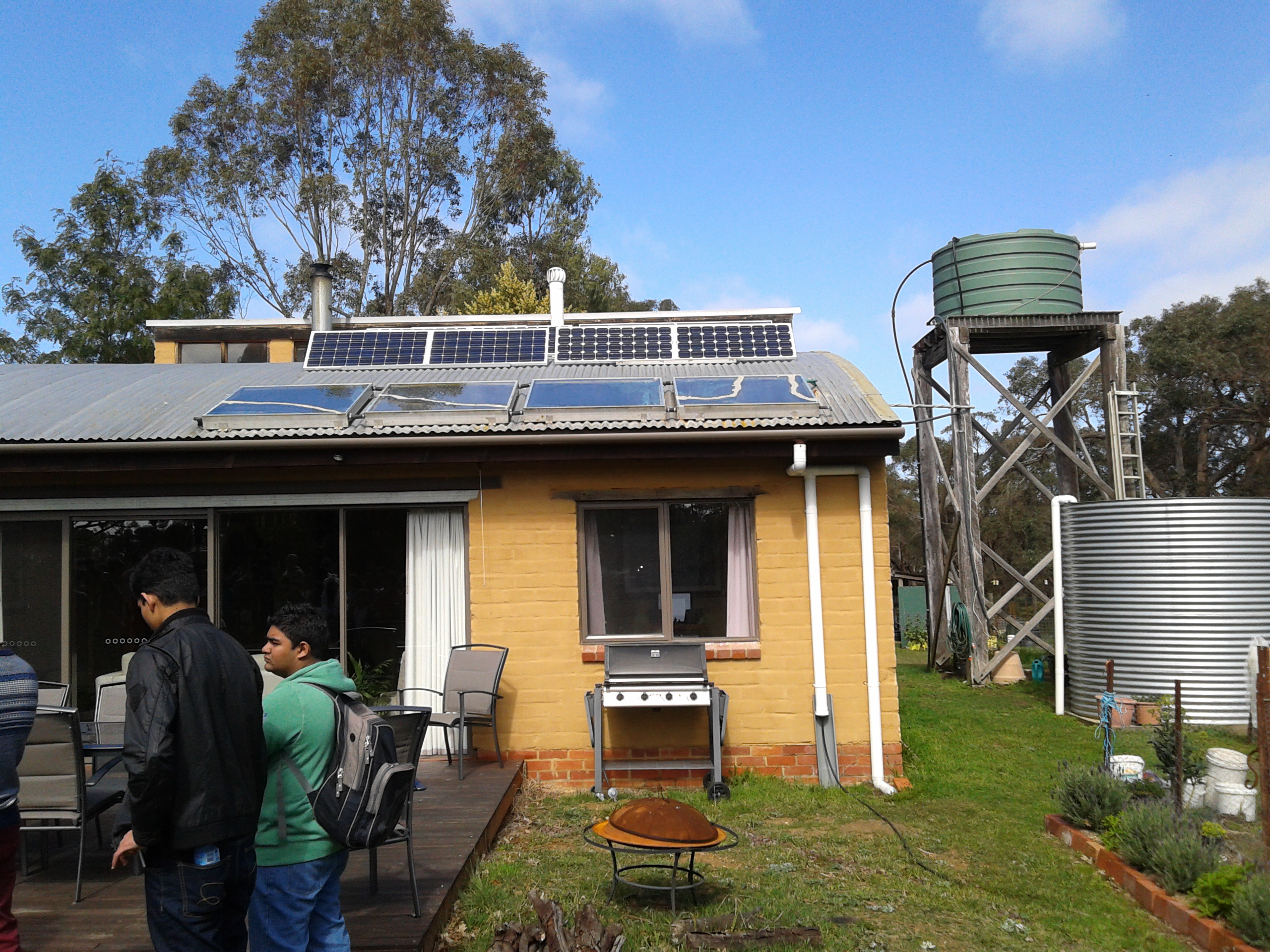 Hare Krishna Valley eco-house outside Winchelsea, Victoria, Australia